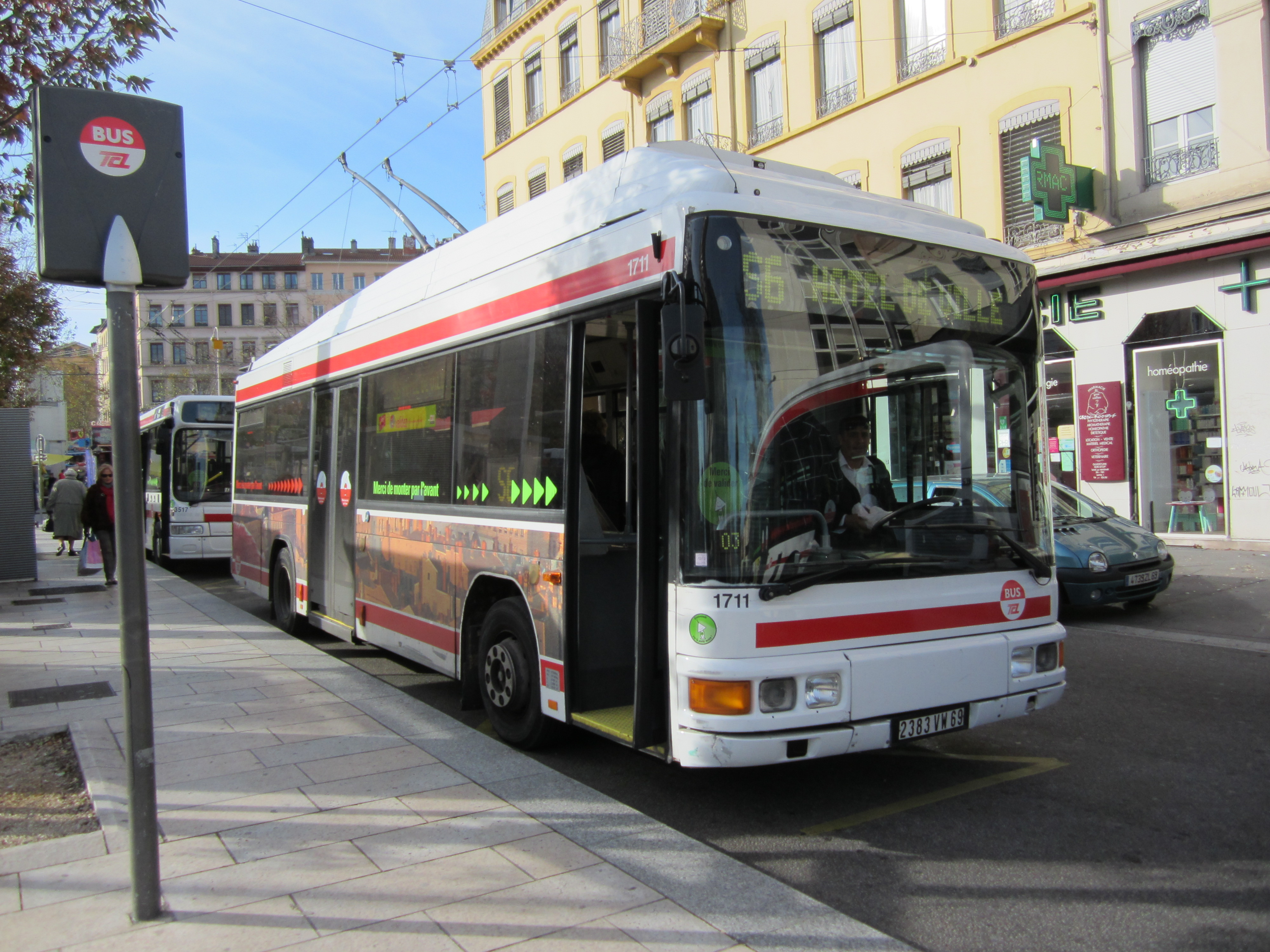 Le 1711 de la ligne 6 à son terminus, Croix Rousse